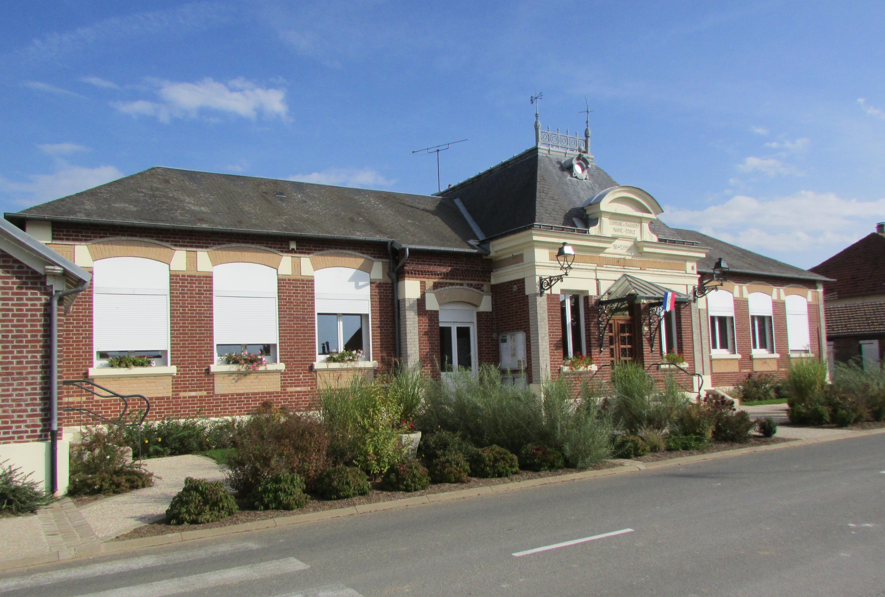 La mairie et l'ancienne école